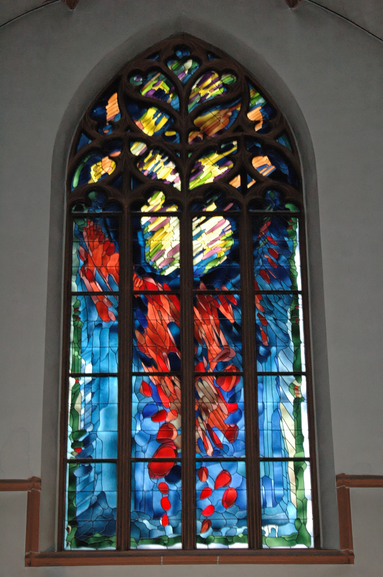 Fenster von St. Bonifatius Gießen; Pfingsten